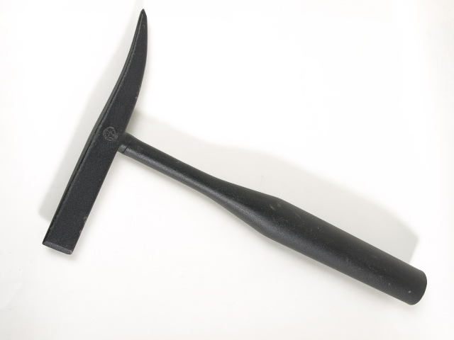 Schweißerhammer nach DIN 5133, schwarz